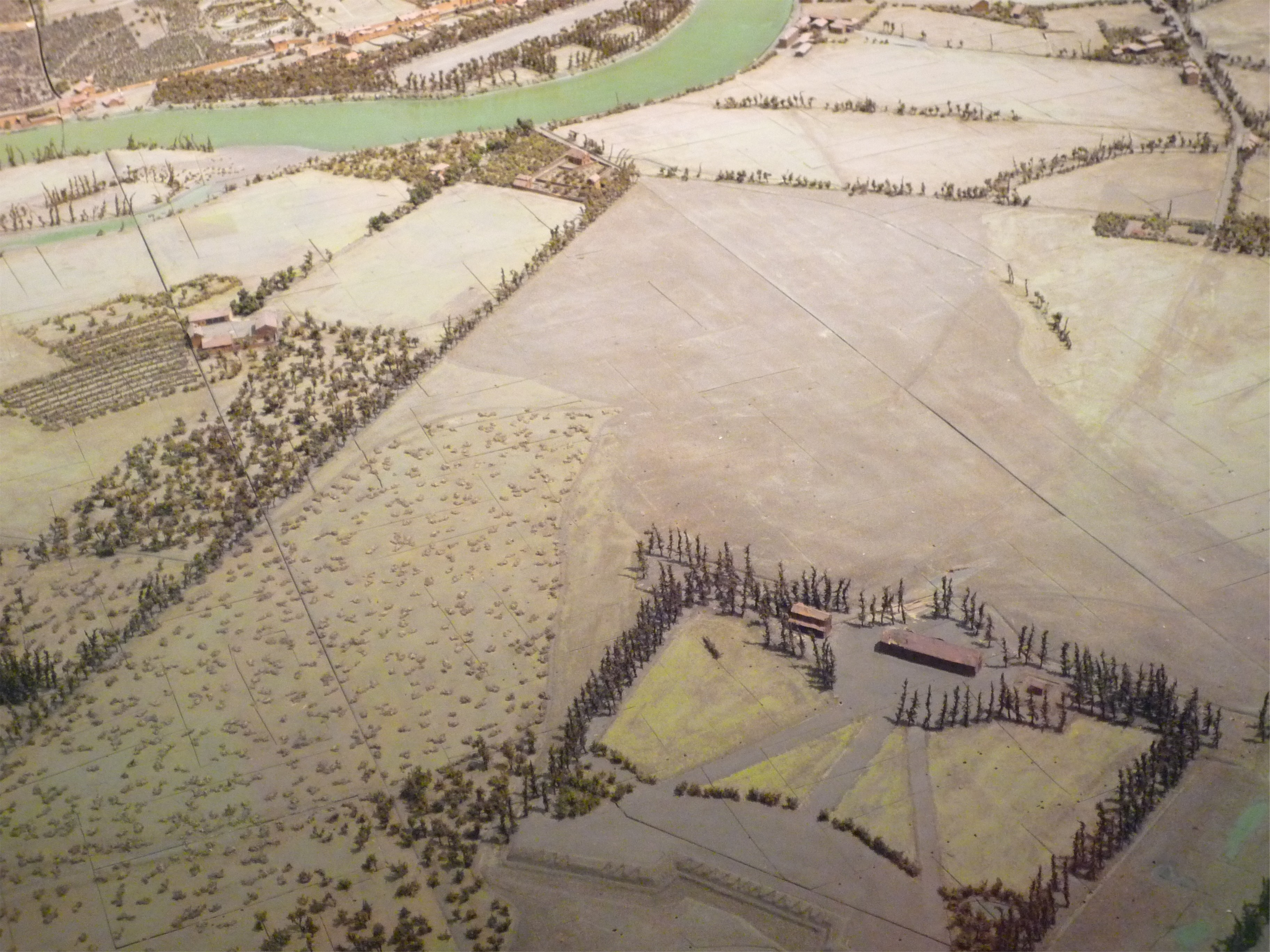 Polygone d'artillerie sur le plan-relief de Grenoble (1848). En haut de l'image, on peut voir l'esplanade de l'autre côté de l'Isère. L'alignement d'arbres sur la droite de l'image préfigure probablement la future rue des Martyrs de l'actuel polygone scientifique.